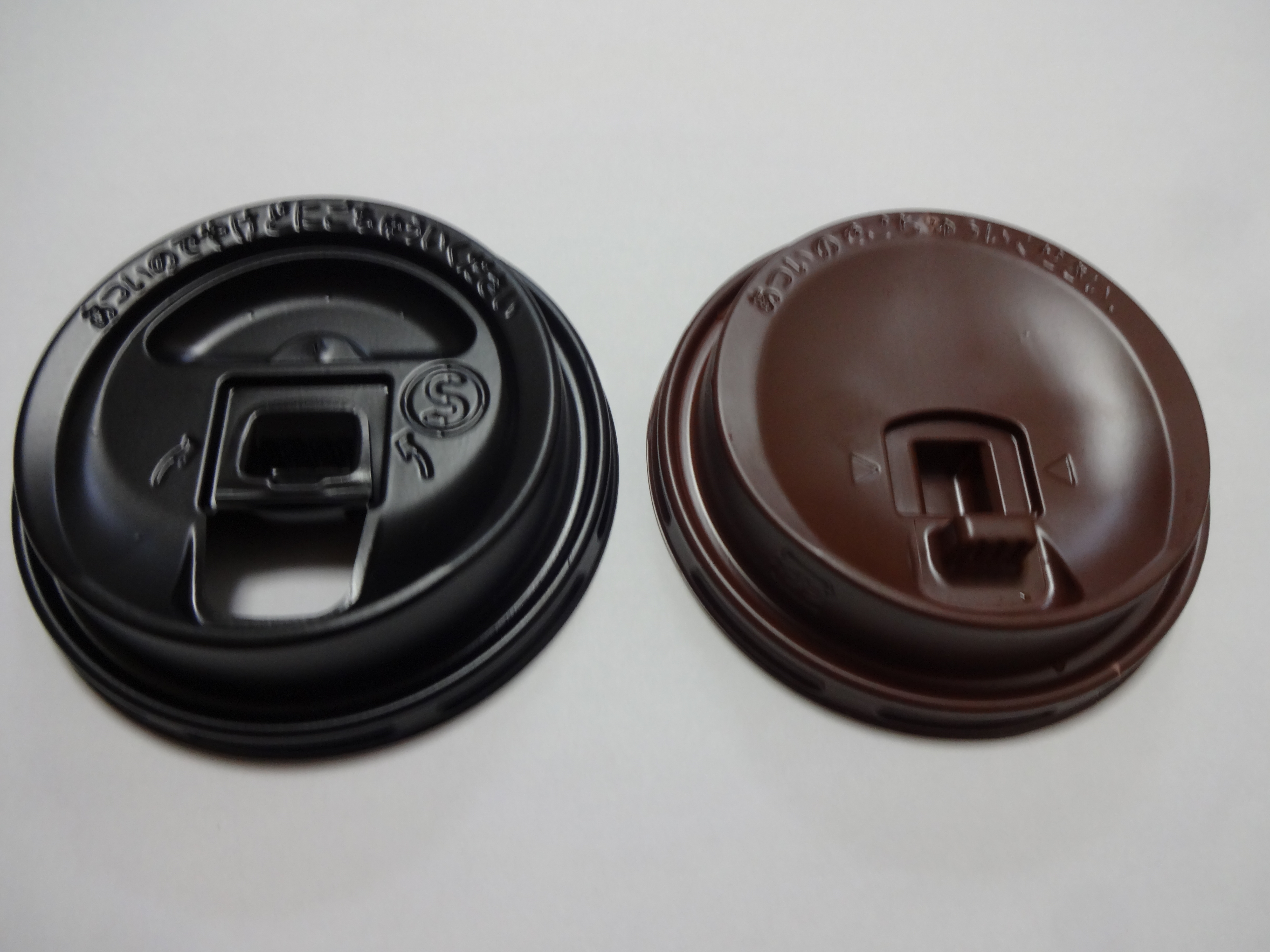 コンビニコーヒーのカップの蓋。左：ファミリーマート、飲み口を開けた状態。右：ローソン、飲み口を開けていない状態。